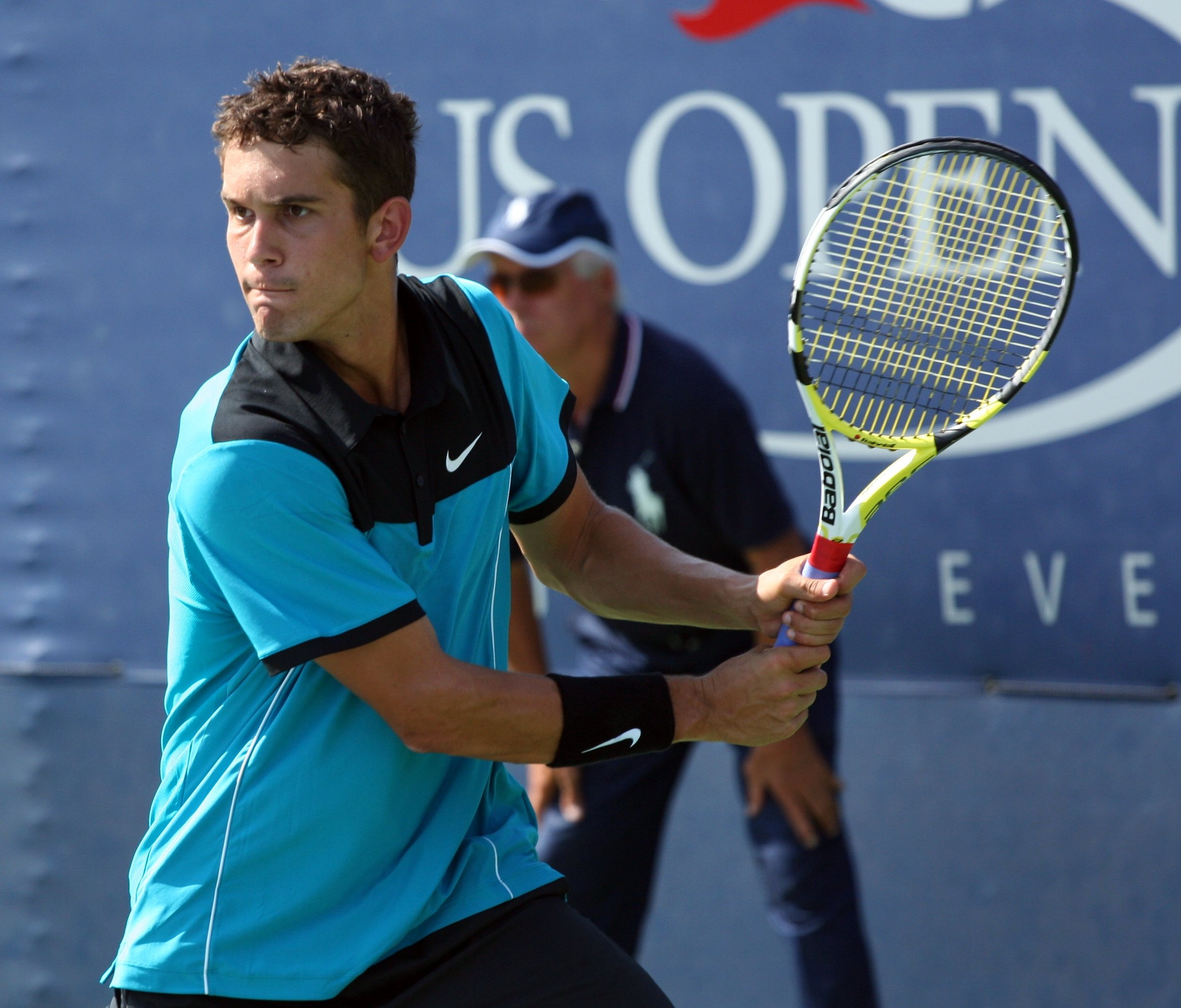 U.S. Open Saturday, Sept. 5, 2009